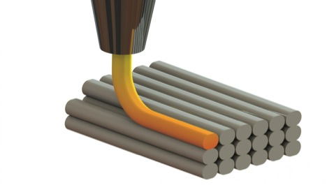 Materialaren urtze bidezko moldeatzea